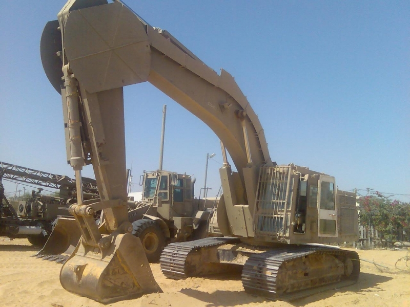 IDF Excavator CAT 330